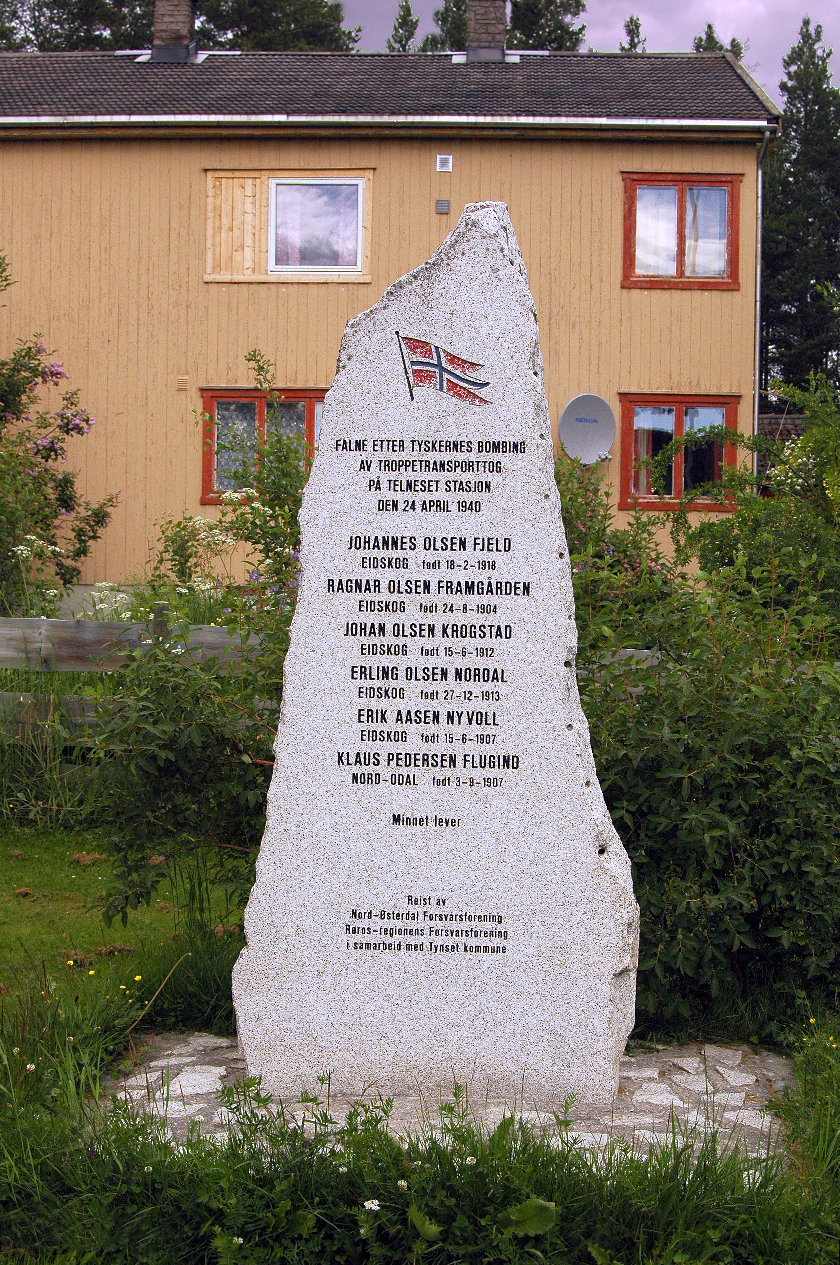 Bilde av steinen som er inne på området, Minnelunden.